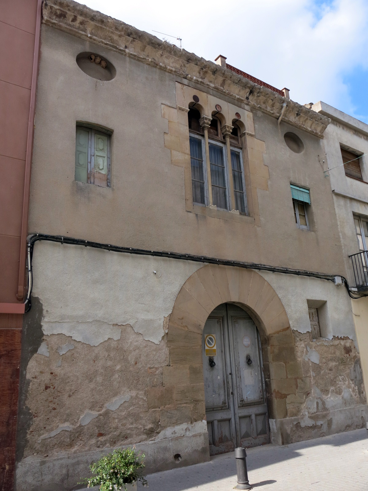 Habitatge al carrer Cavallers, 2 bis (Esparreguera)